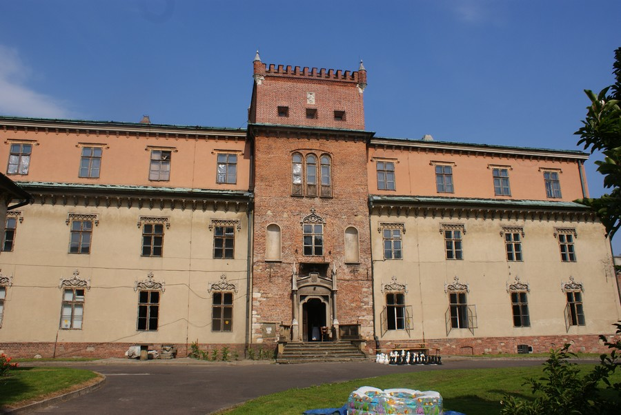 Zator, pałac Potockich